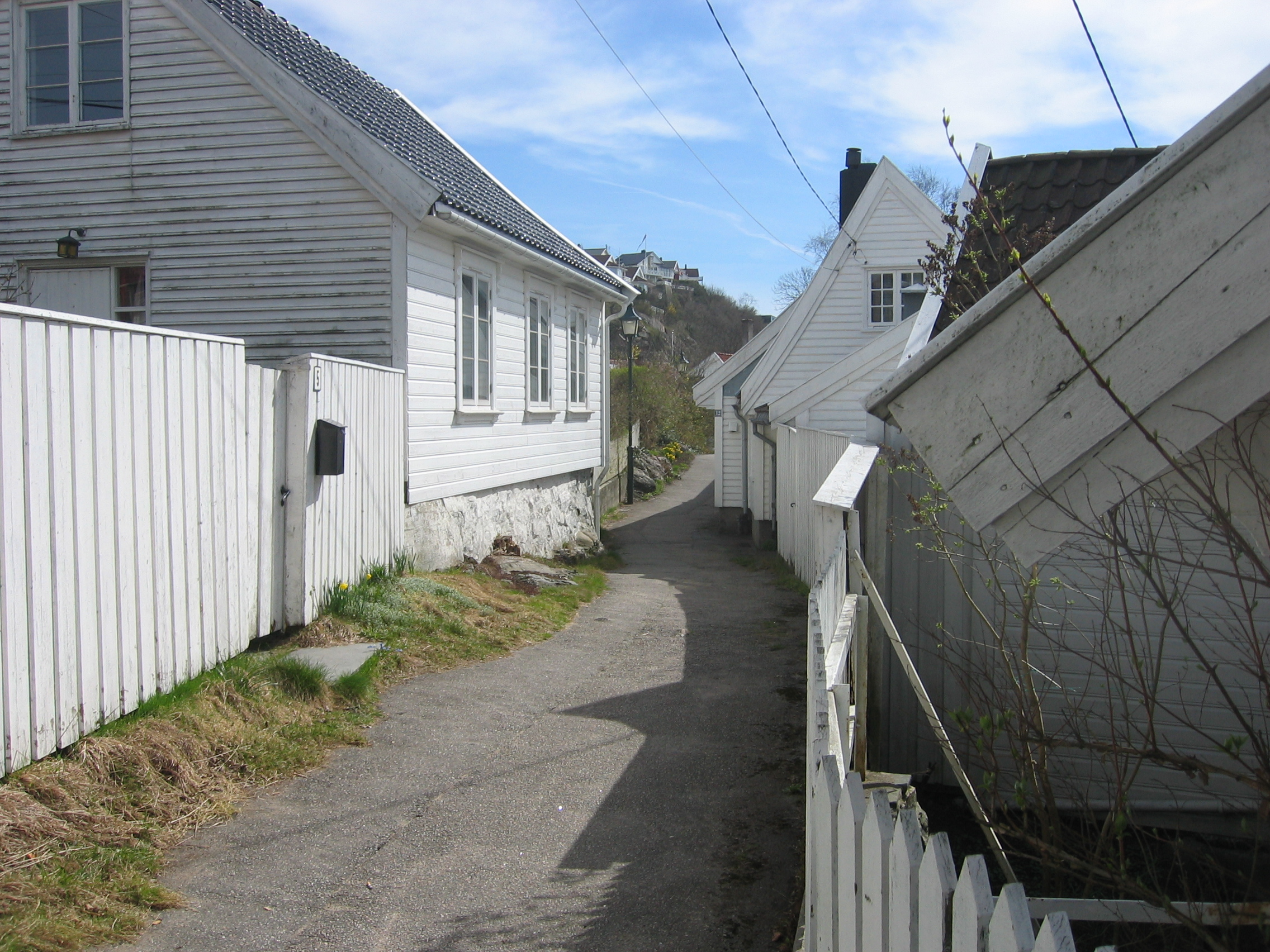 Vindmøllegangen in Kristiansand, Norway